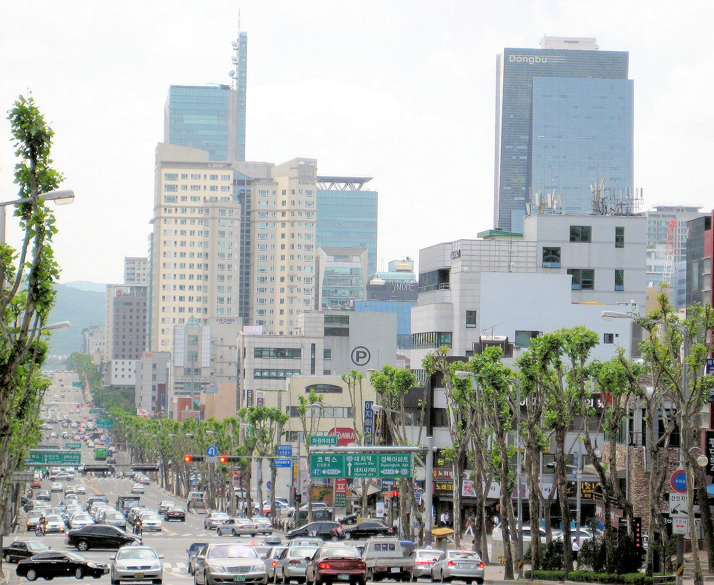 Avenue in Gangnam